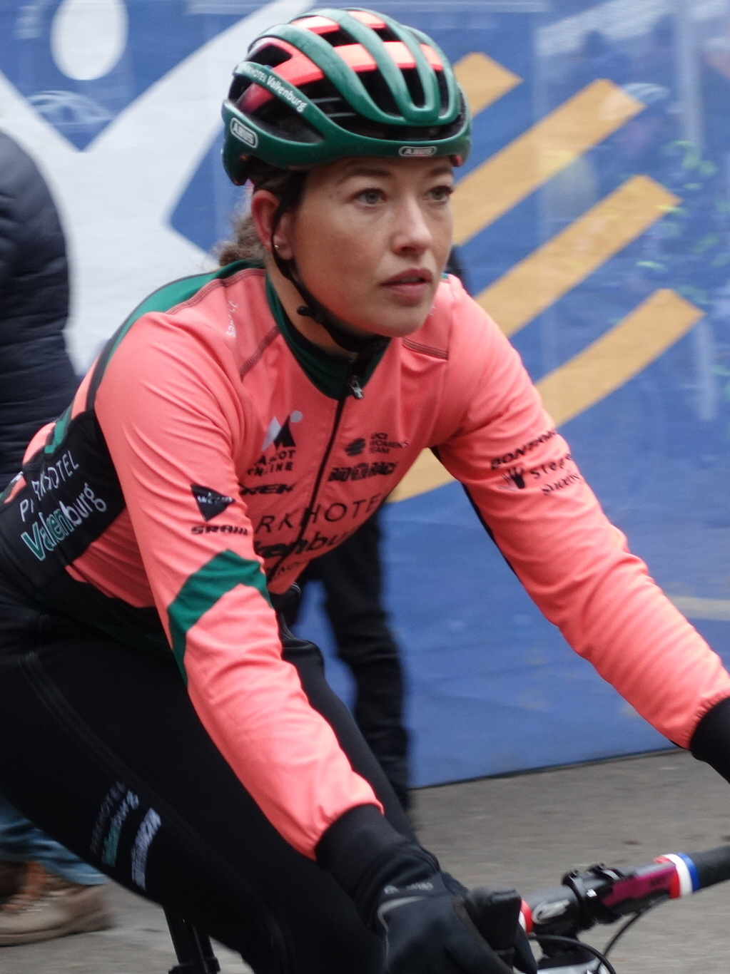 Voor de start van de tweede editie van de Brussels Universities Cyclocross (DVV Verzekeringen Trofee) op de campus van de VUB & ULB op zondag 5 januari 2020.